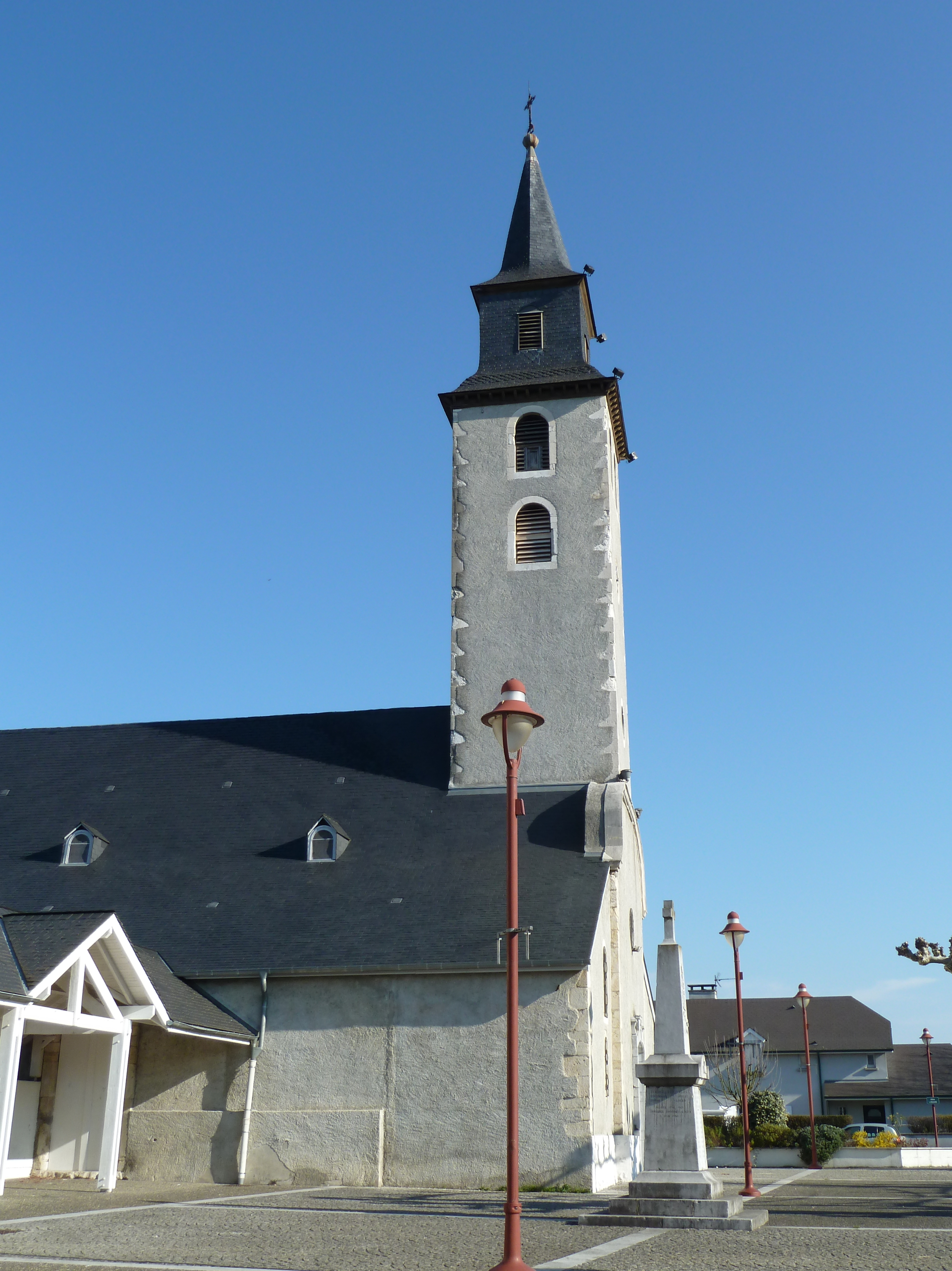 Église de Denguin